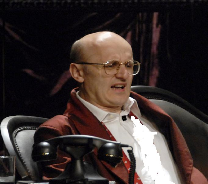 Scena iz predstave